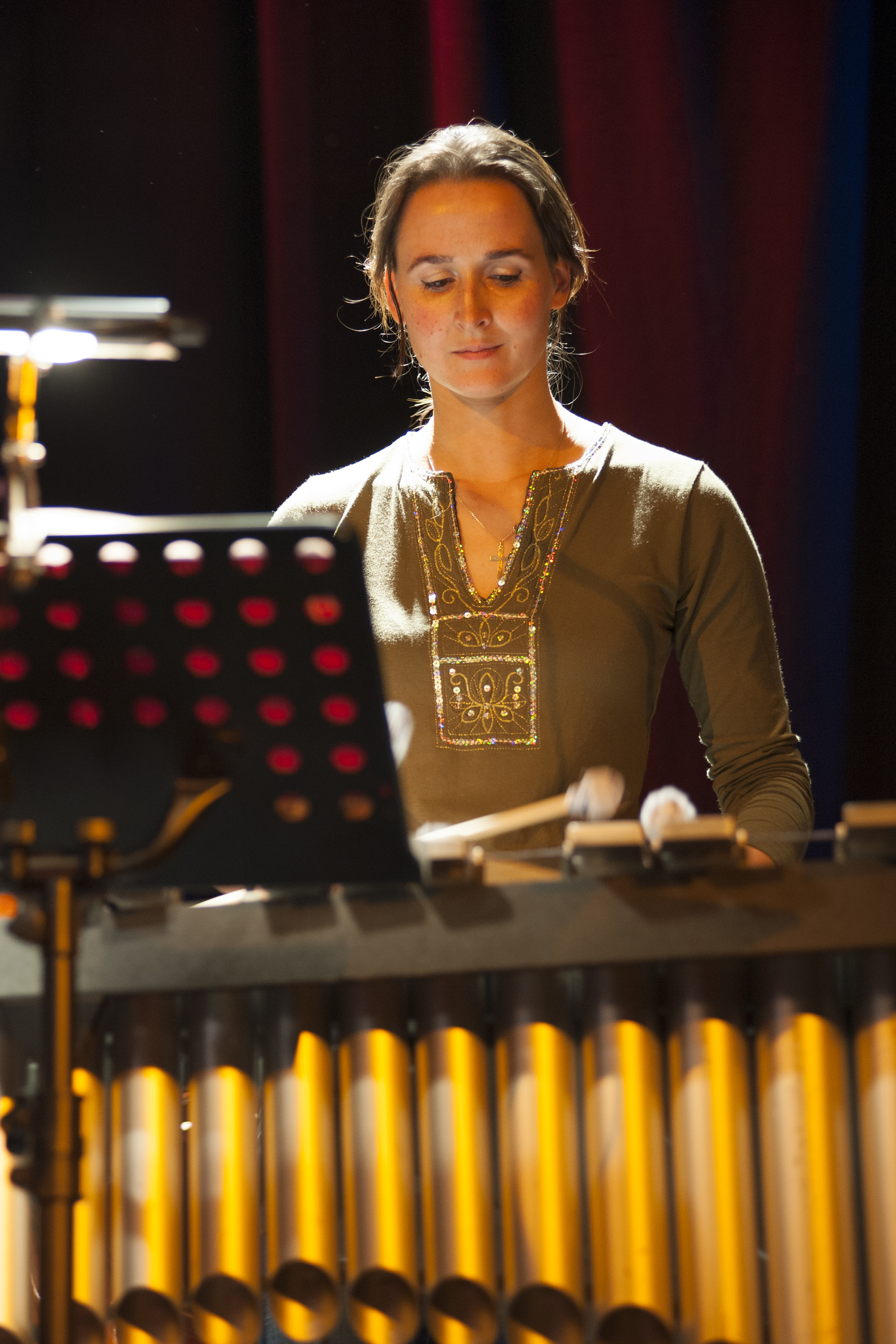 Izabella Effenberg, Nürnberg, 17.10.2009